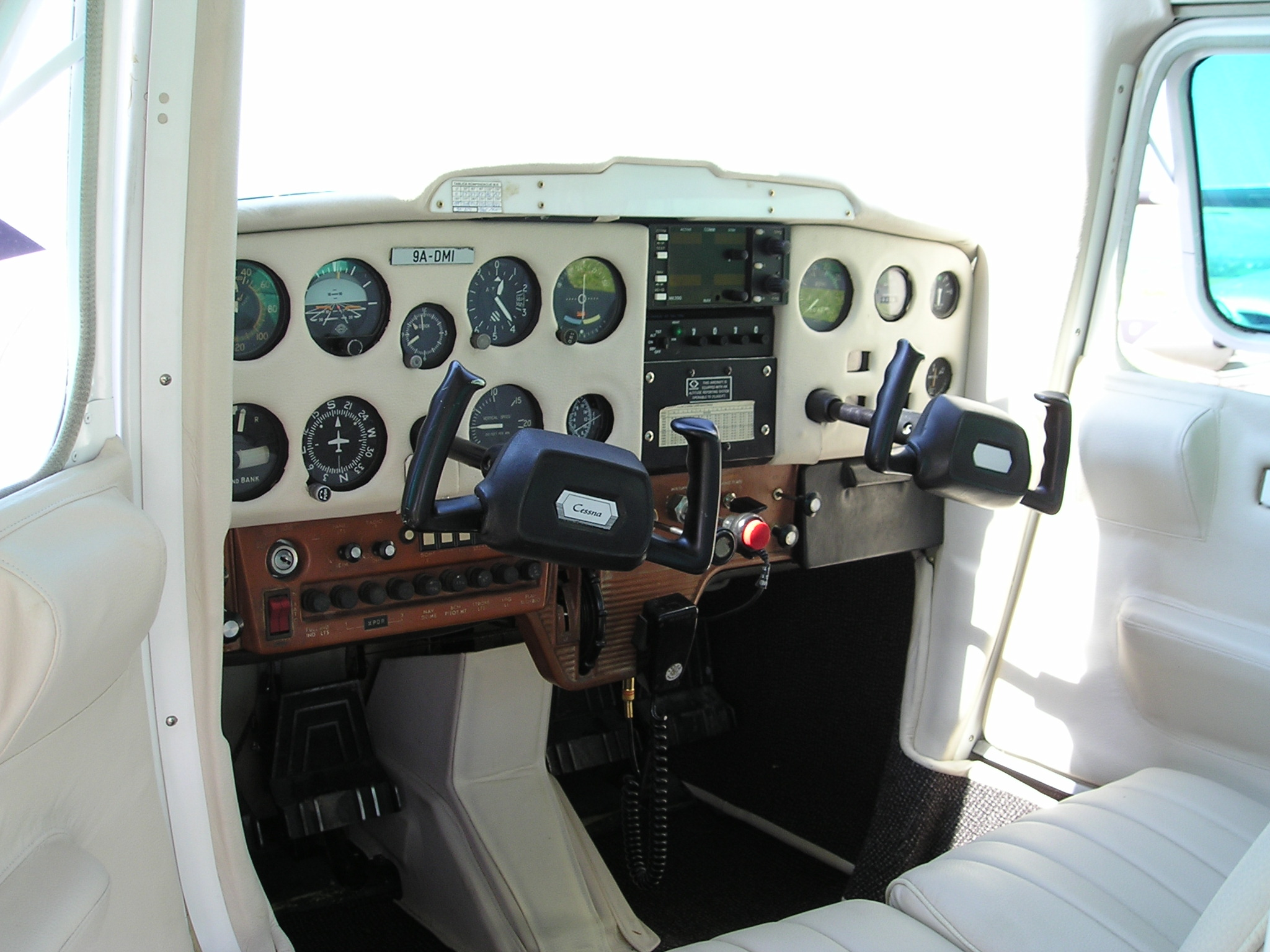 Pilotska kabina zrakoplova